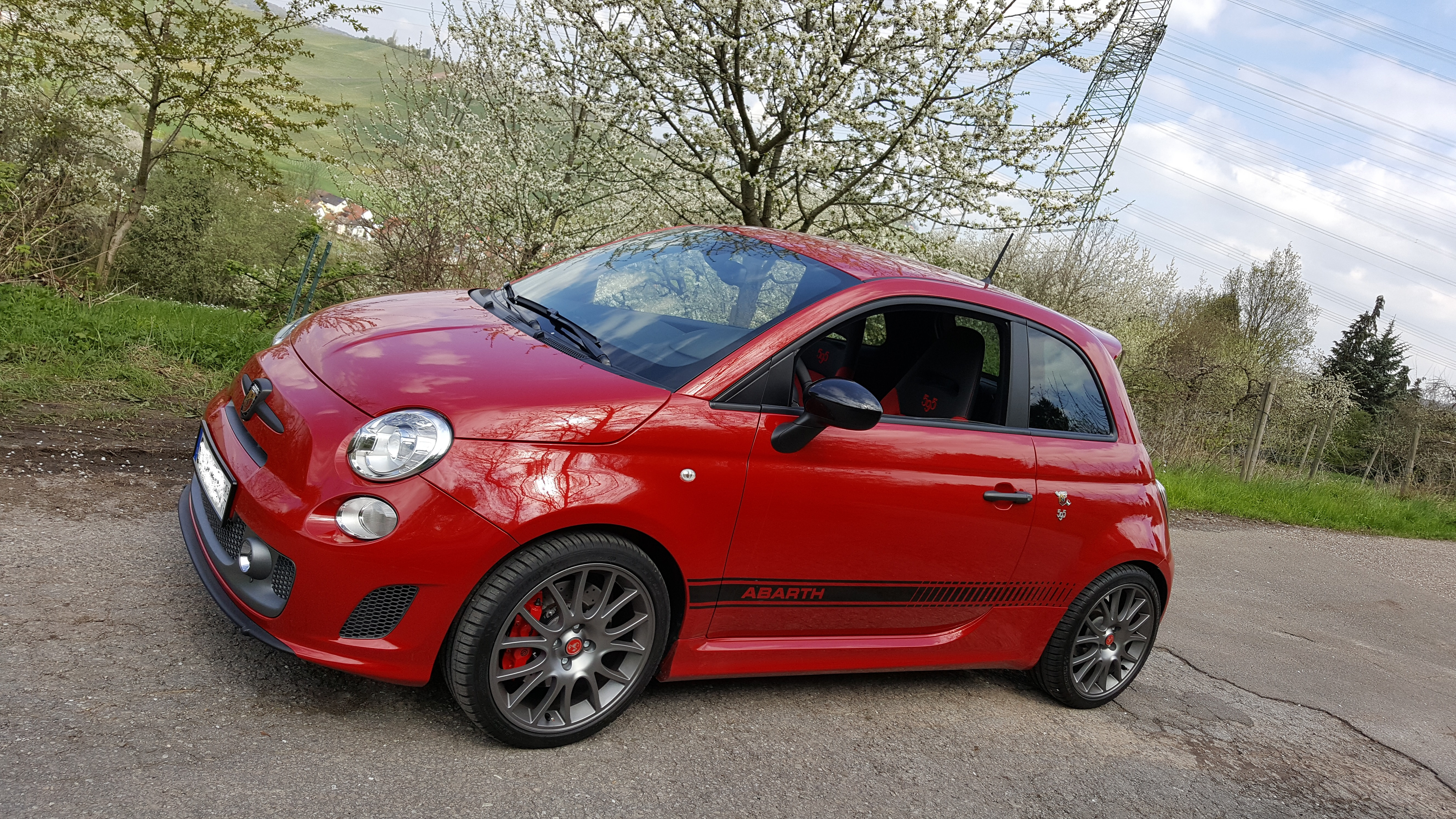 Rosso Tristrato (Cordolo Rot)